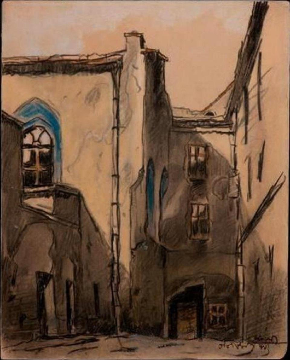 Вид на синагогу "Турей Захав" (Золотой Розы) с улицы Шклярской (Школьной) за Большой городской синагогой во Львове.